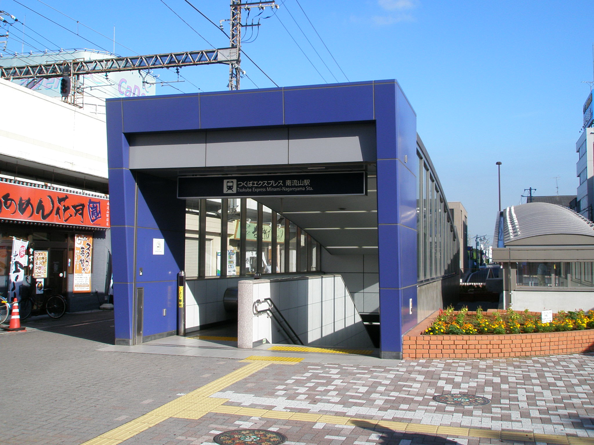 つくばエクスプレス南流山駅入口